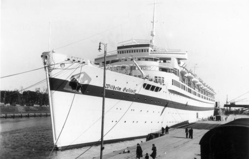 Scherl Bilderdienst: II. Weltkrieg 1939 - 1945, Überfall auf Polen am 1. September 1939. Das KdF - Schiff "Wilhelm Gustloff" wird als Lazarettschiff eingesetzt, hier im Danziger Hafen im Herbst 1939. 12065 - 39